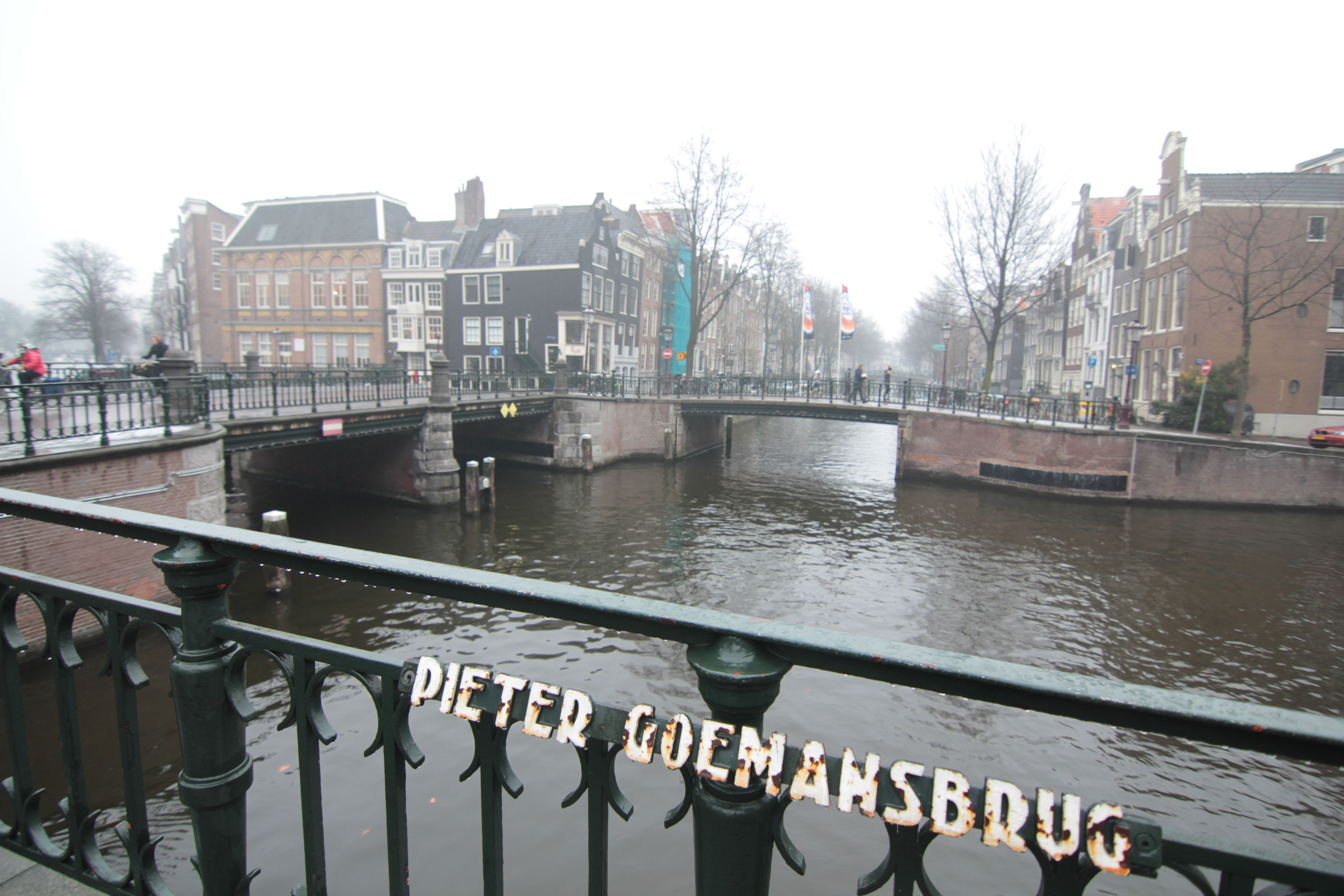 De Pieter Goemansbrug (brug 93) en de